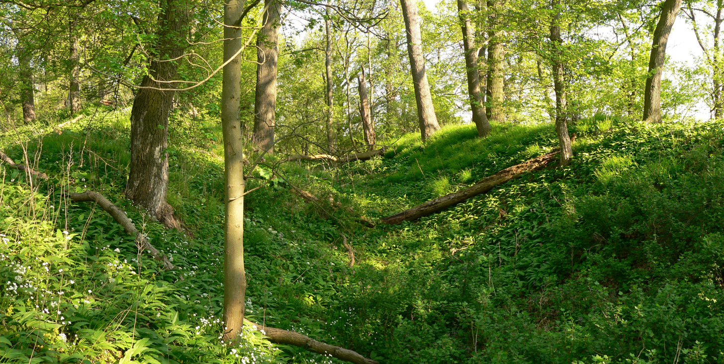 Burggelände der Harliburg mit Wällen und Graben